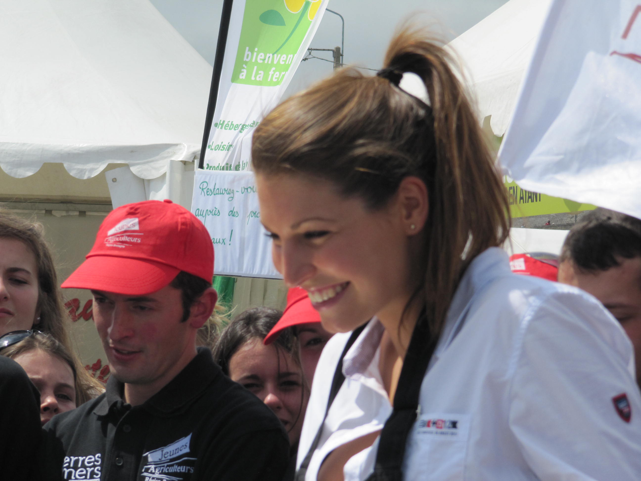 Laury Thilleman, Miss France 2011, Nolwenn Leroy et les Frères Morvan sur le village Terres et mers de Brest 2012